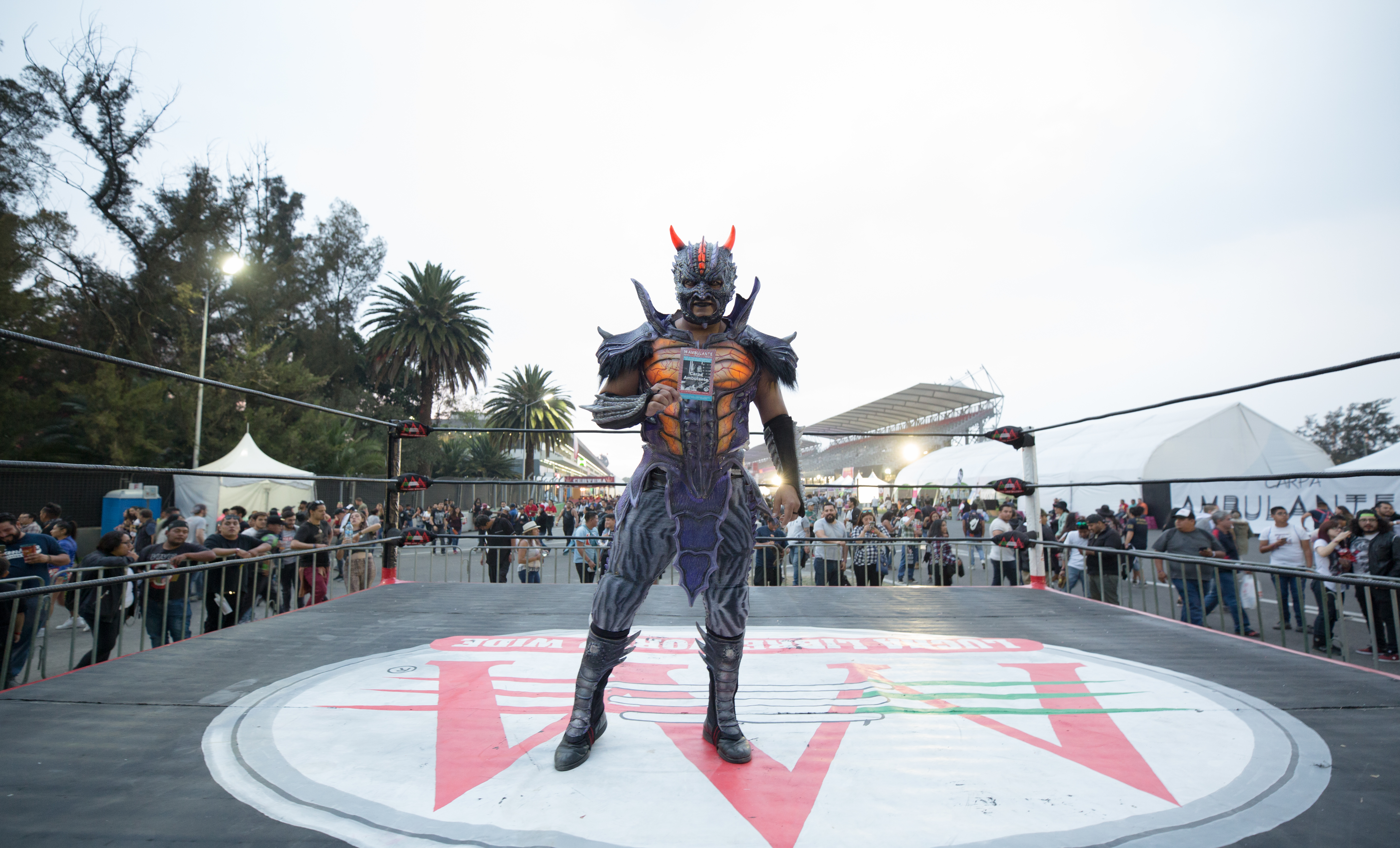 Le catcheur Drago en 2019